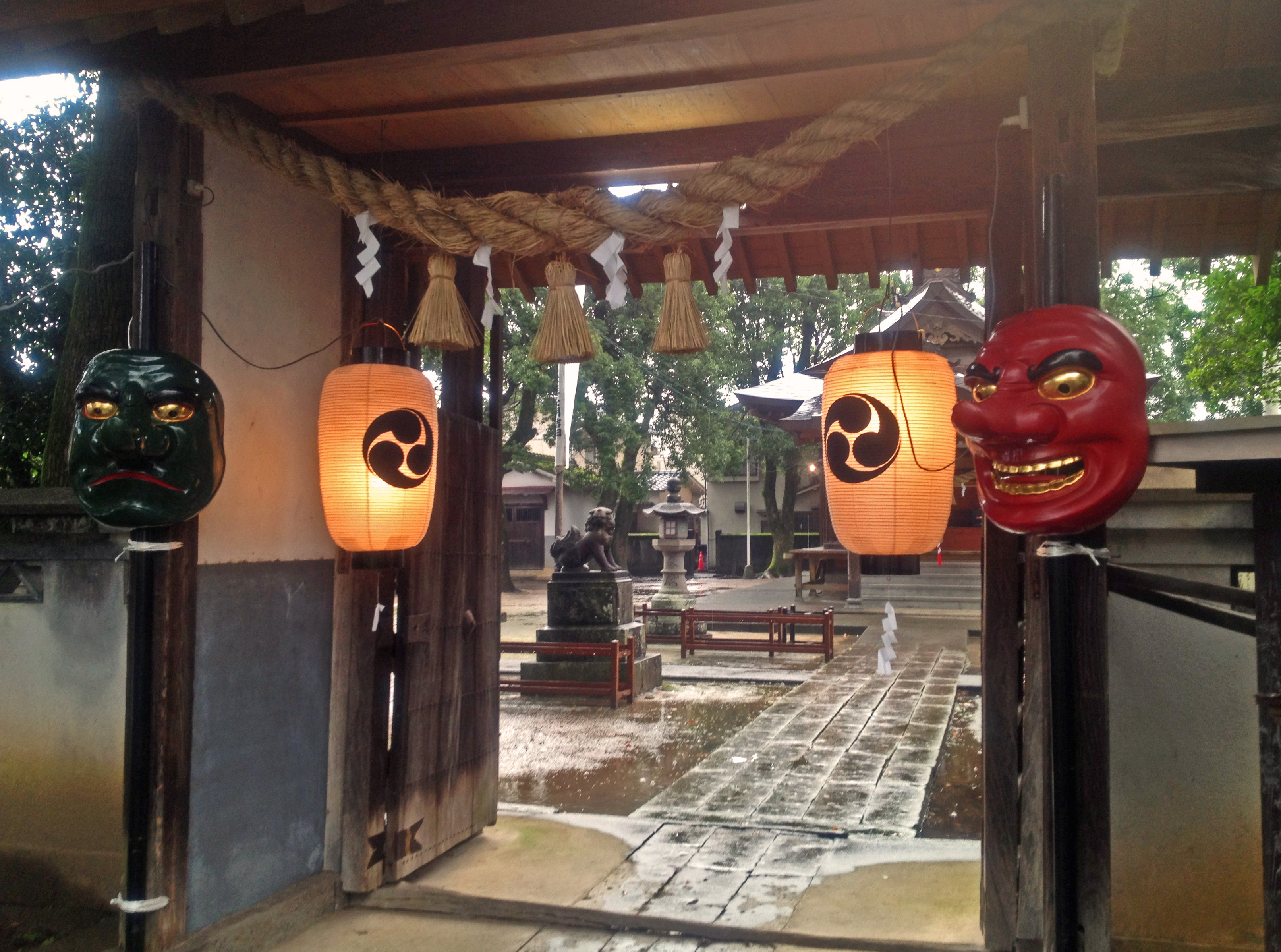 大分県日田市竹田・若宮地区にある「若八幡宮」（通称、竹田若宮神社）の神門。日田祇園祭山鉾巡行行事十五日（7月22日）の様子。